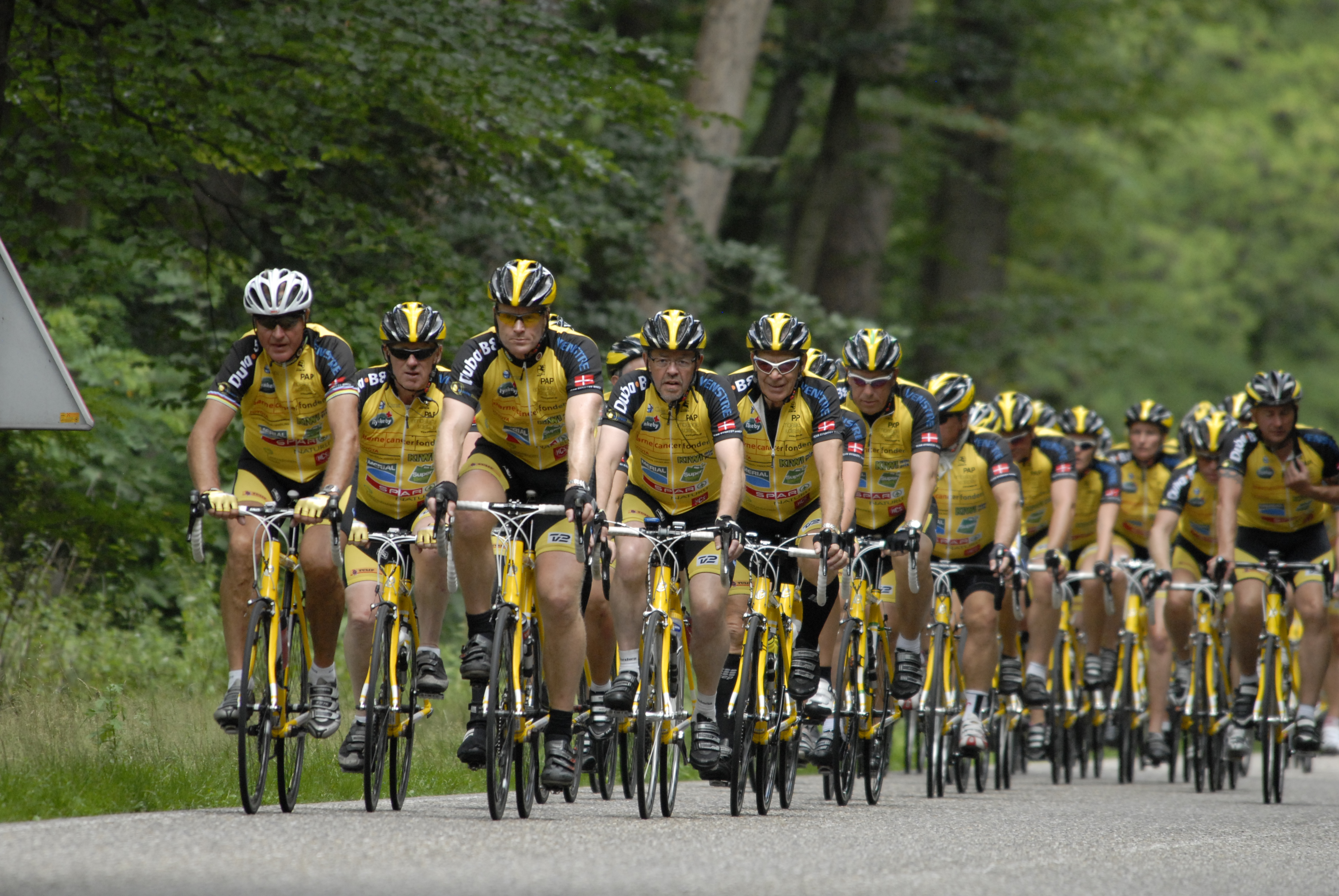 Team Rynkeby i forbindelse med velgørenhedscykelholdets 10. tur til Paris til fordel for Børnecancerfonden og Barncancerfonden i 2011.